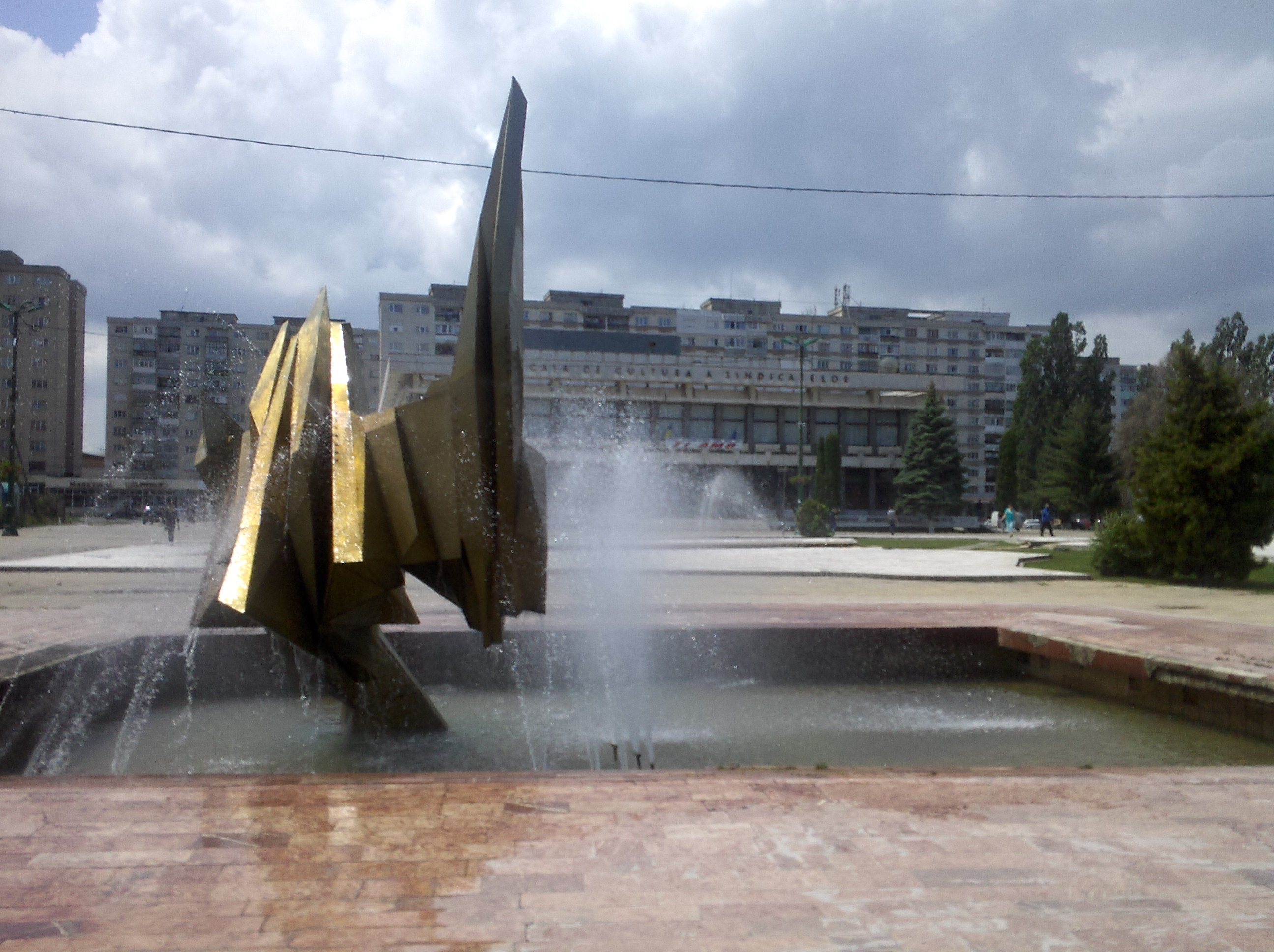 Fântâna arteziană şi Casa de Cultură din Oneşti.